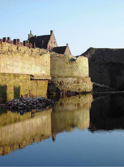 Stadsmuur met torenresten havenkade